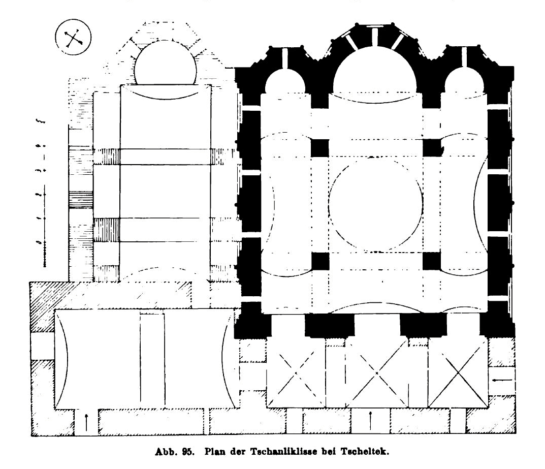 Çanlı Kilise, Byzantinische Kirche bei Aksaray, Kappadokien, Türkei. Plan von Hans Rott